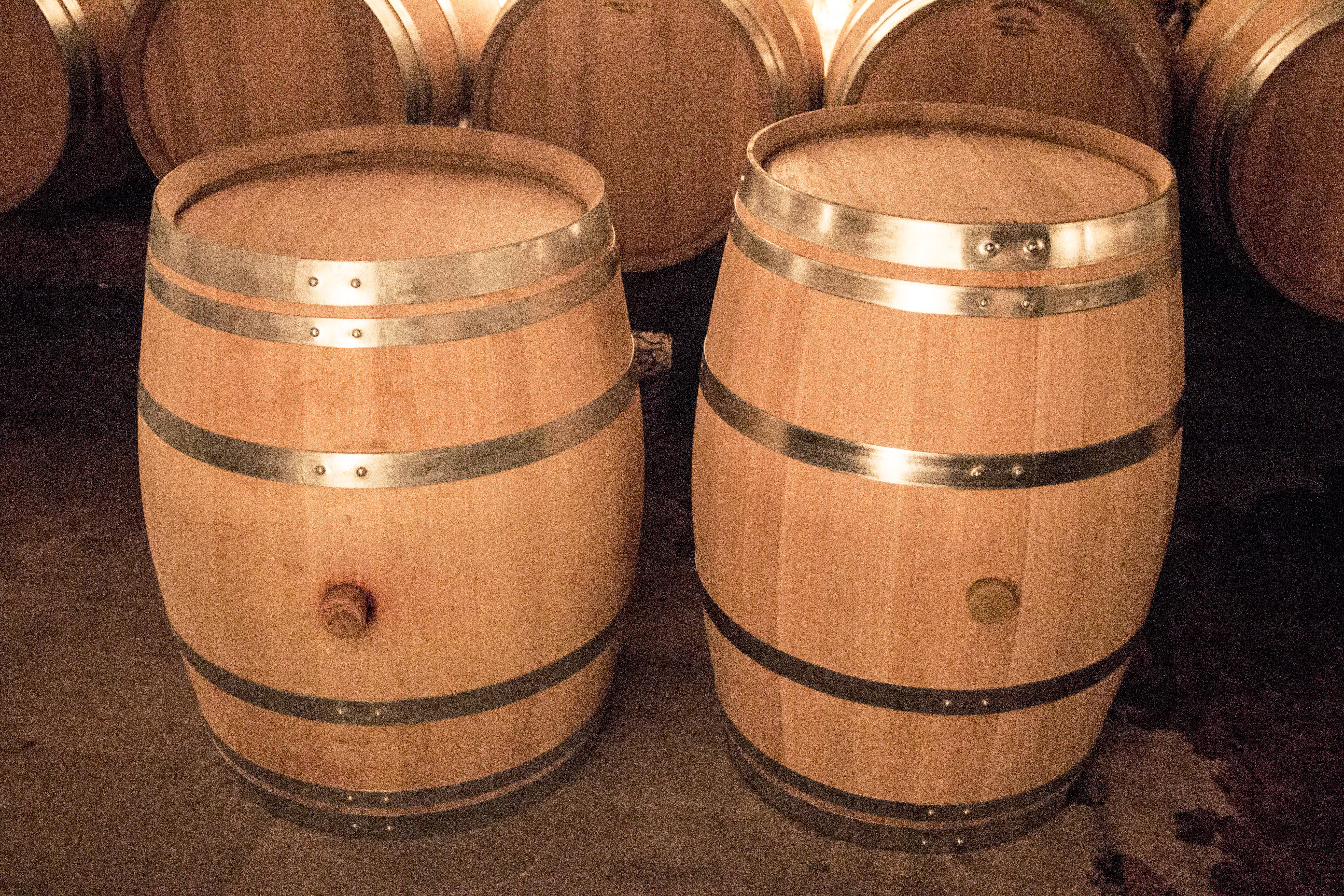 Différences entre fût bourguignon à gauche (228 L), et barrique bordelaise à droite (225 L), sur les dimensions et le volume.